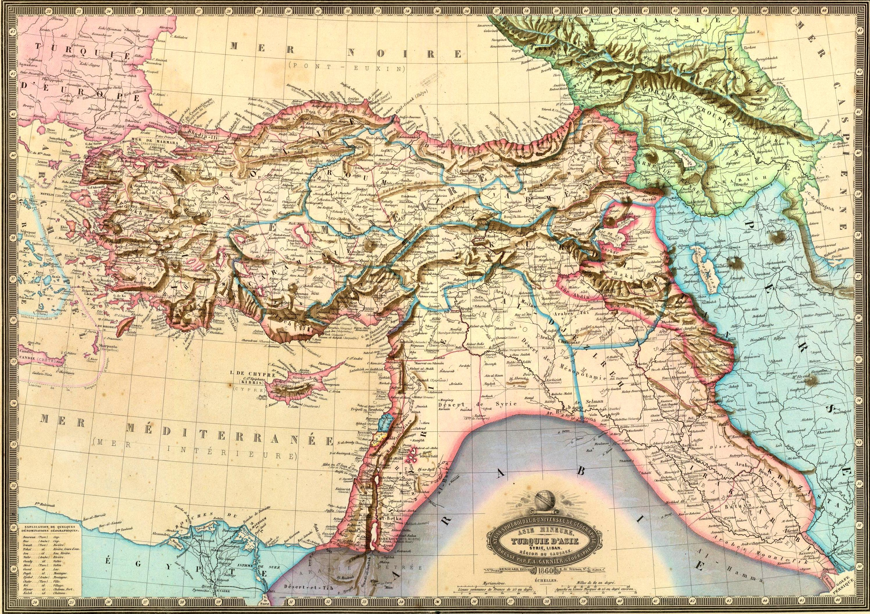 Asie Mineure. Turquie d'Asie, Syrie, Liban. Region du Caucase. Atlas spheroidal & universel de geographie dresse par F.A. Garnier, geographe. Vve. Jules Renouard, Editeur, Rue de Tournon, no. 6, Paris. 1860. Impie. Sarazin, r. Git-le-Coeur, 8, Paris.